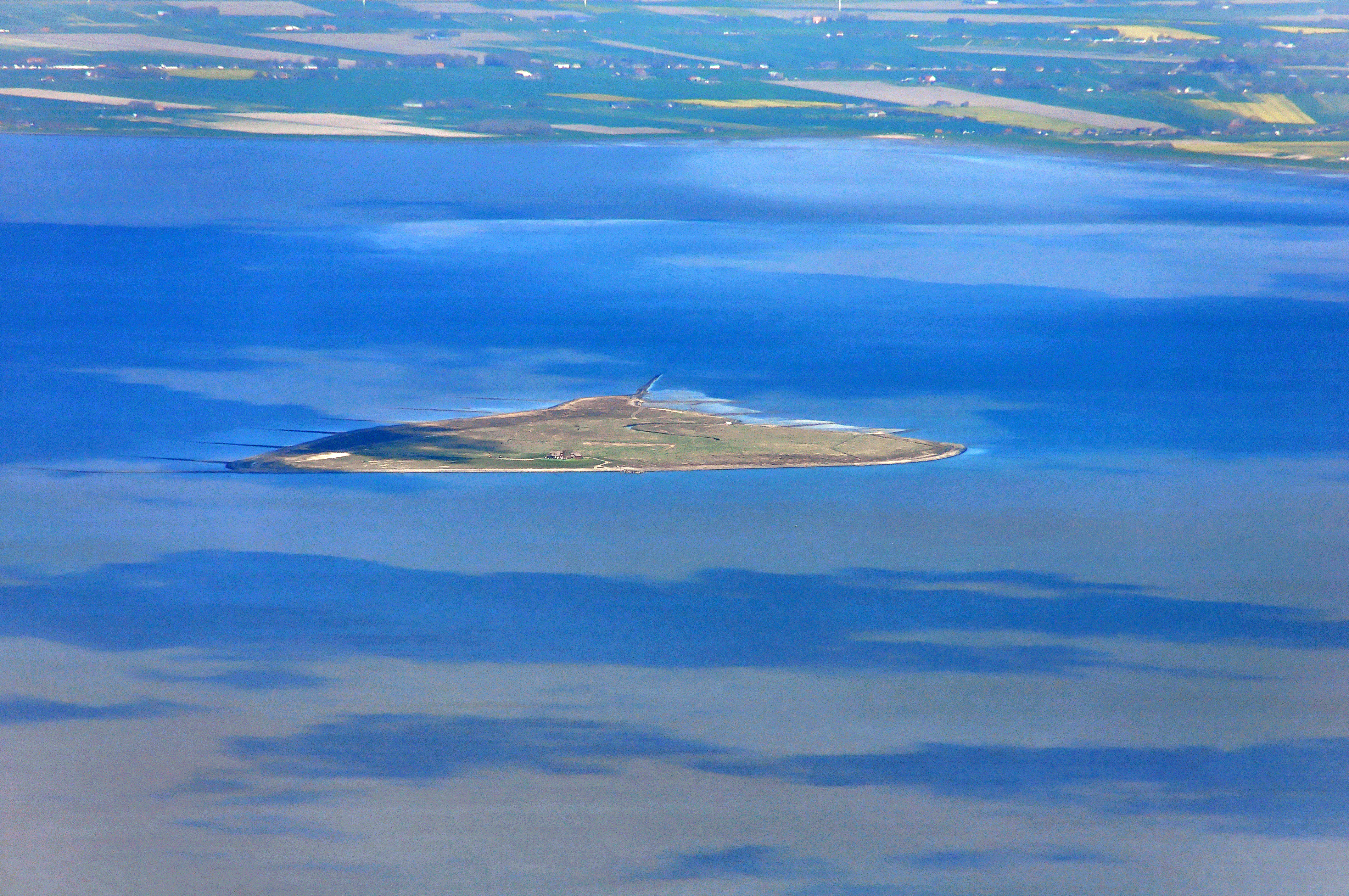 Luftbilder von der Nordseeküste 2012-04: Südfall